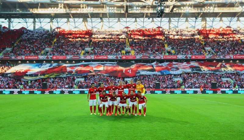 Состав футбольного клуба «Спартак» (Москва) на матче открытия 5 сентября 2014 года с «Црвеной Звездой».